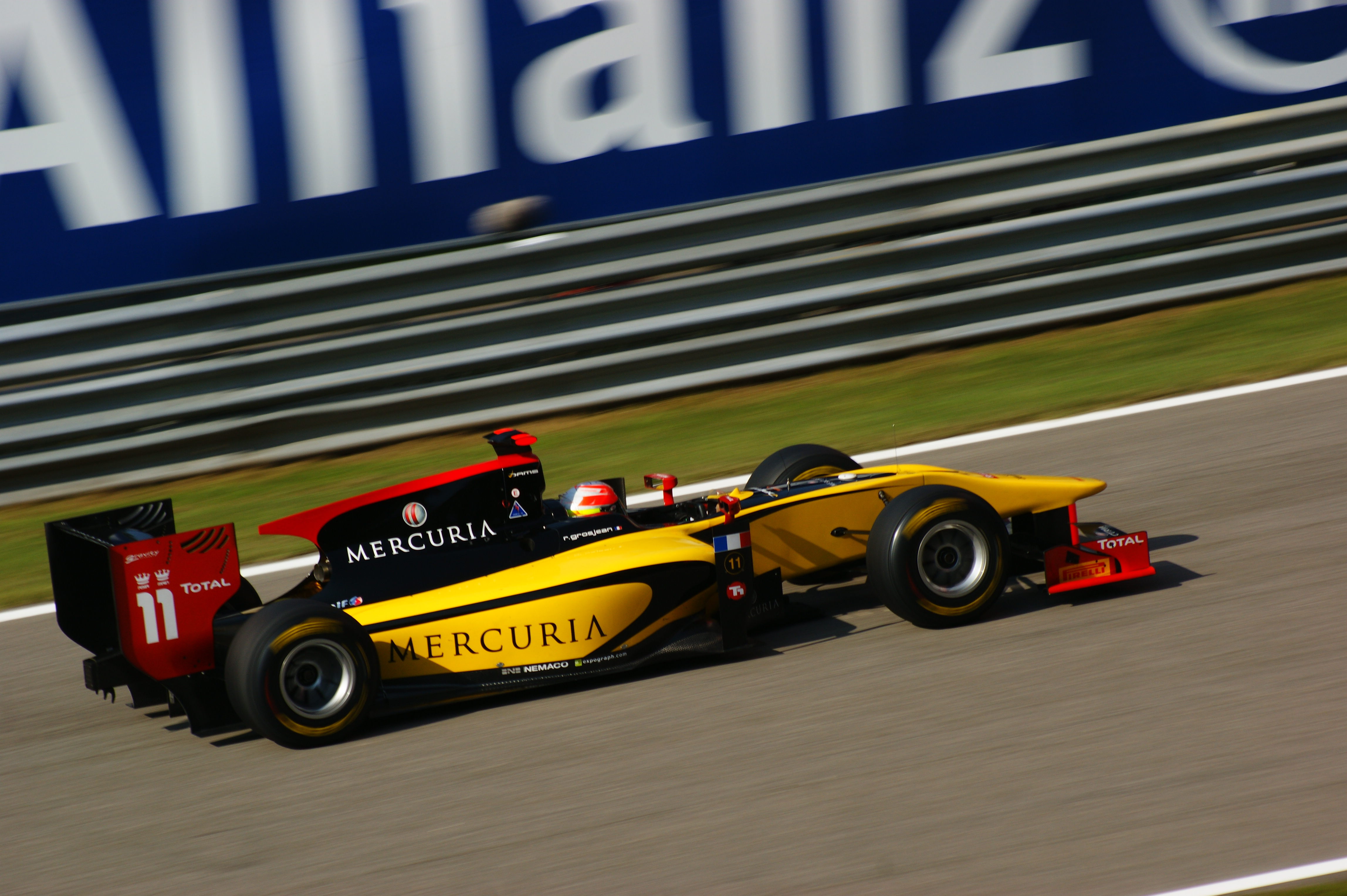 Romain Grosjean alla variante della roggia Monza 2011